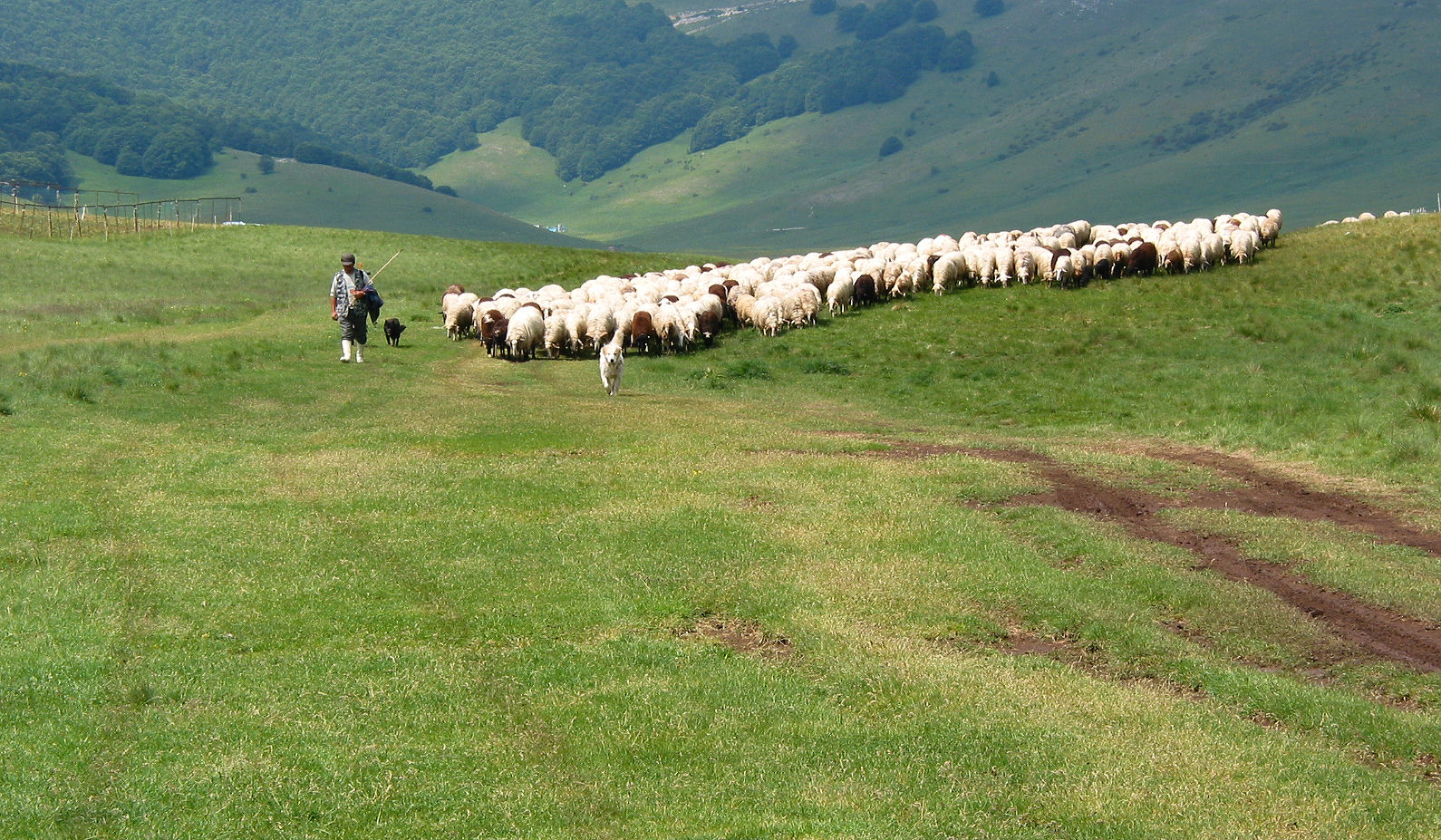 Pâturage en altitude.Pastore, Parco Nazionale dei Monti Sibillini